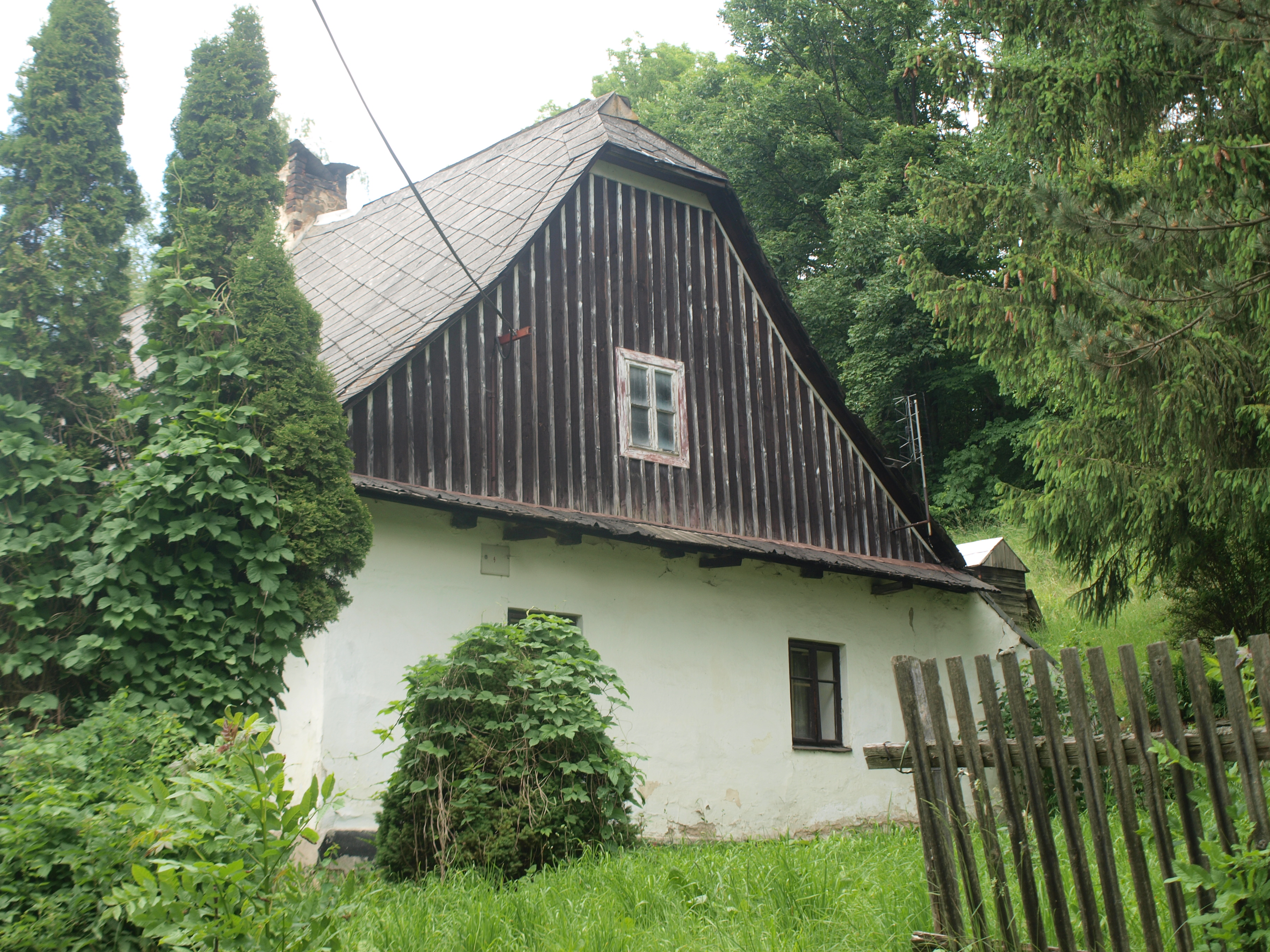 Usedlost č. 94 v Horním Václavově v okrese Bruntál.